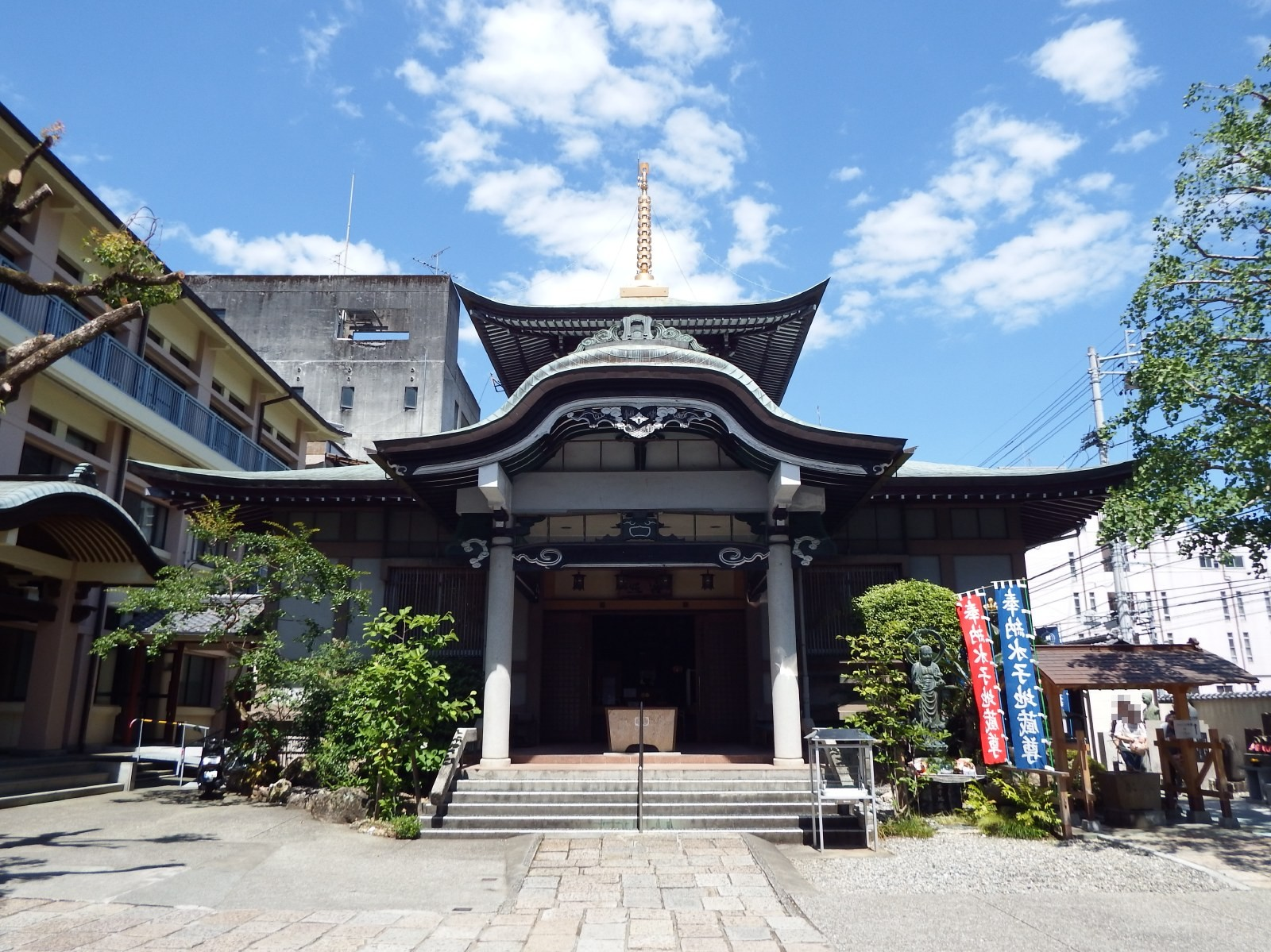 高野寺（高知県）